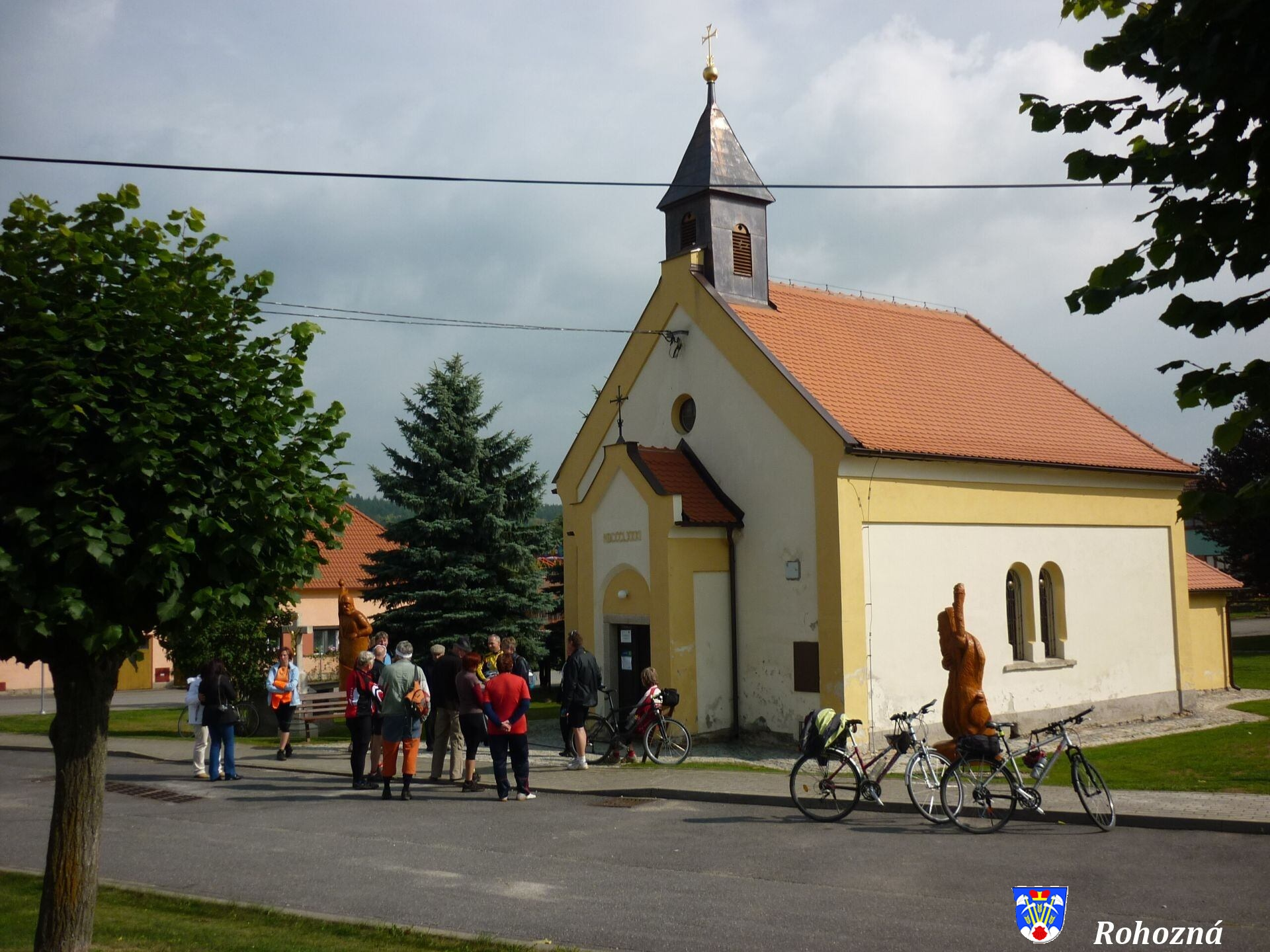 Rohozná - Kaple sv. Václava